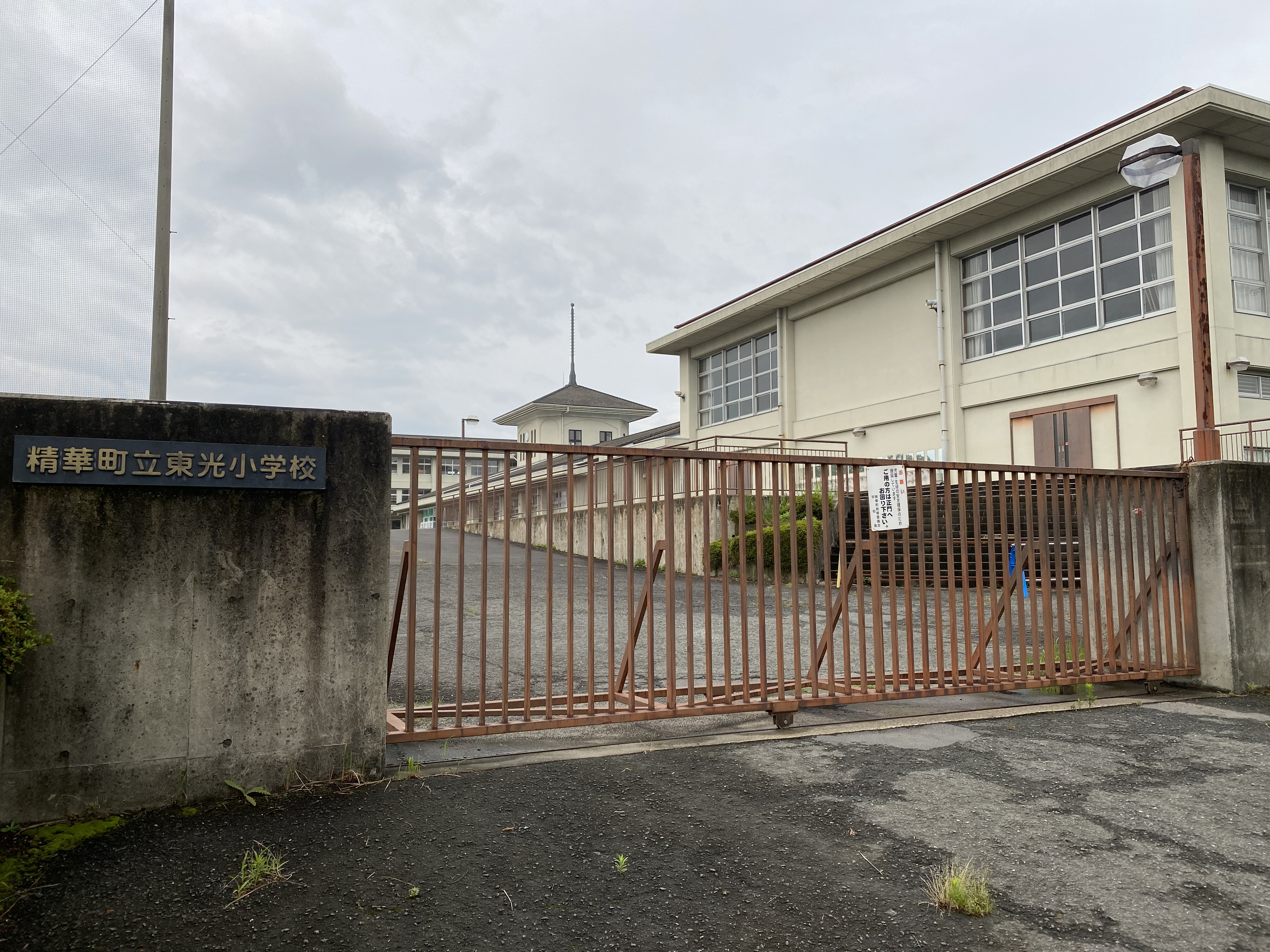 京都府相楽郡精華町光台7丁目43番地１に位置する、精華町立東光小学校の北門